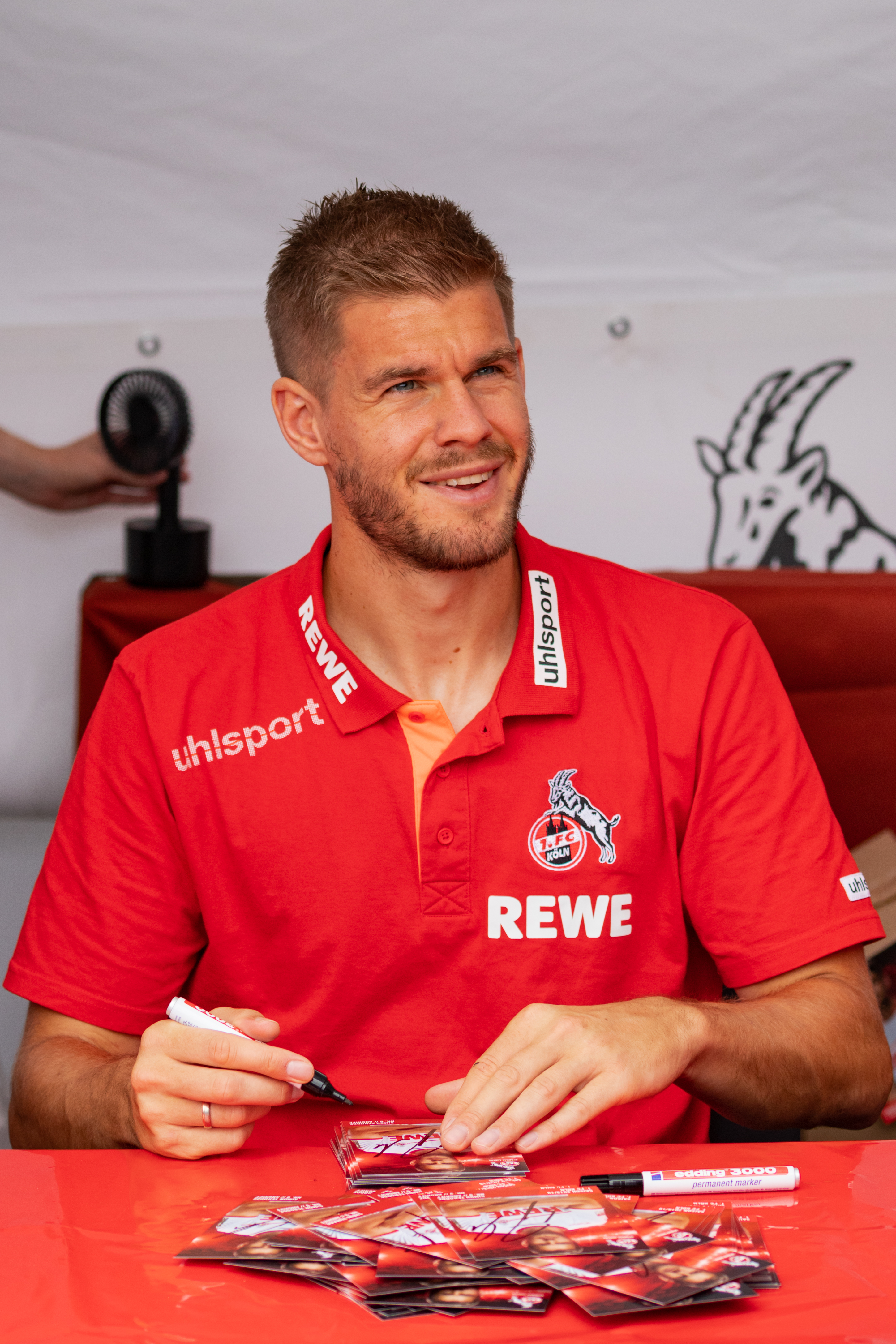 Simon Terodde 1. FC Köln